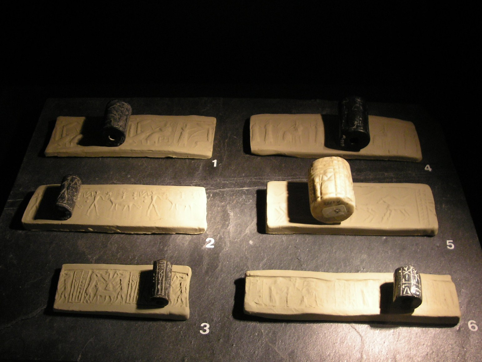 (1) Rollsiegel, Akkad-Zeit, ca. 2200 v. Chr. Geflügeltes Himmelstor auf einem Stier, Lebensbaum, ein Diener hält die Stricke des Himmelstors. (2) Rollsiegel, Assyrisch, 2000 v. Chr. Gilgamesch auf der Suche nach dem baum der Unsterblichkeit, der durch einen Drachen gehütet wird. Die Löcher sind Höhlen gefährlicher Tiere. (3) Rollsiegel, Irak, Babylon, Mitte 1. Jahrtausend v. Chr. Steatit. Privatbesitz. Babylonische Kopie altsumerischer Motive und (missverstandener) altsumerischer Schriftzeichen. (4) Rollsiegel. Babylon, Akkad-Zeit, ca. 2300 v. Chr. Steatit. Anbetung vor dem Gott "Ea", befruchtendes Wasser. (5) Rollsiegel, Babylon, Djemdet-Nasr-Zeit, 2800 v. Chr. Kalkstein. Die Heilige Herde vor dem Tempel. (6) Rollsiegel, Babylonisch 3000 v. Chr. Schwarzer Steatit.